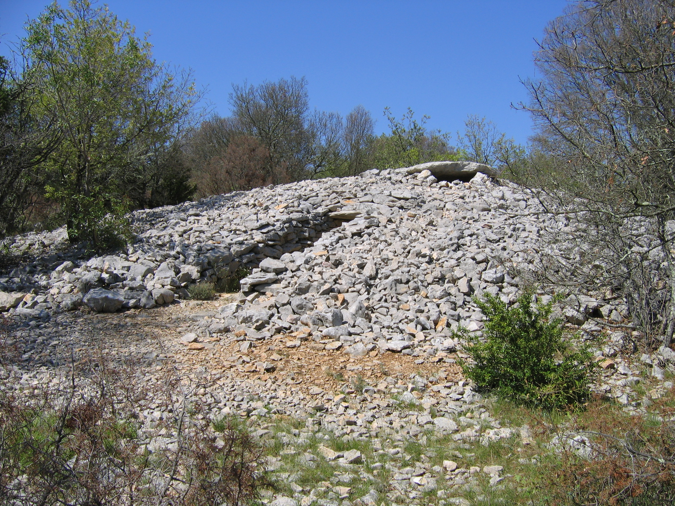 Cairn recouvrant un dolmen, Grand dolmen du Lamalou (deuxième moitié du IVe millénaire avant notre ère), Hérault, France.